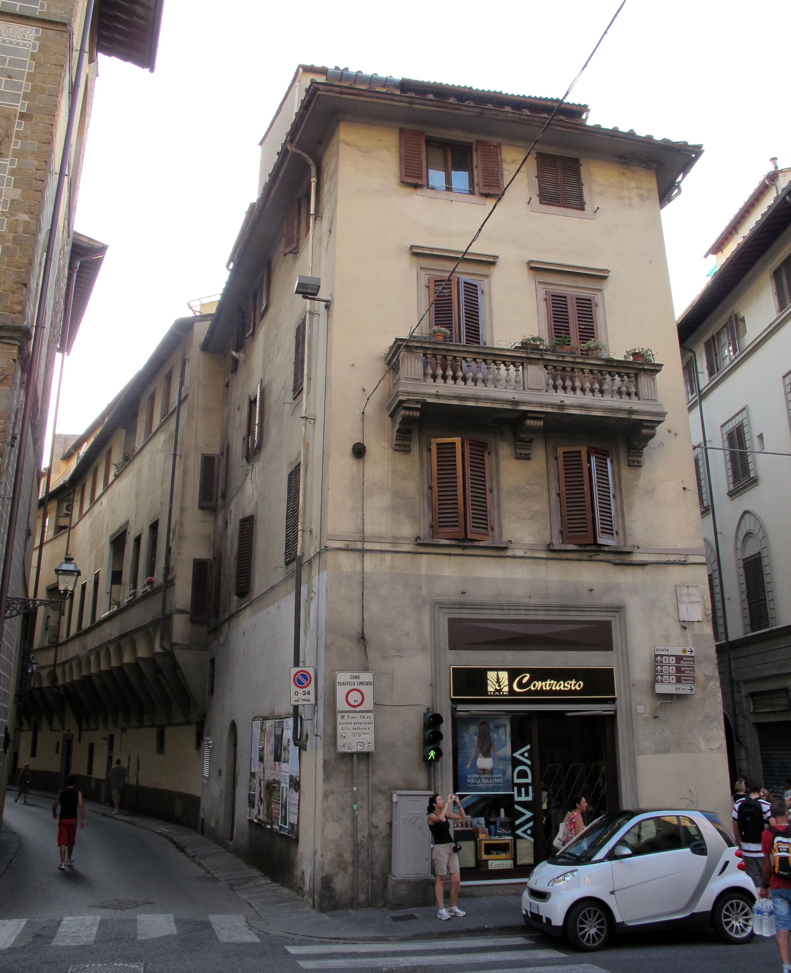 Casa Rossi, fi